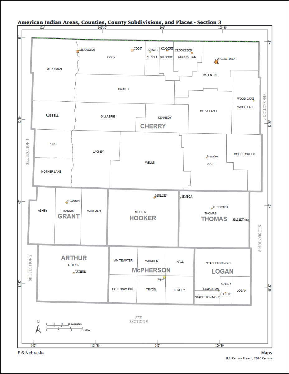 County subdivision map of Nebraska (part), covering Cherry, Grant, Hooker, Thomas, Arthur, McPherson, Logan Counties